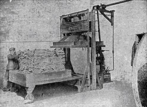 Historische Abwelkpresse mit ausfahrbarer Pressplatte der Lederindustrie. Abwelkpresse mit einer ausfahrbaren unteren Preßplatte in normaler Länge. Bei dieser Anordnung ist keine kontinuierliche Arbeit möglich, sondern das Aus- und Abladen geschieht außerhalb der Presse. Während dieser Zeit wird die Preßarbeit unterbrochen. Da die einfache Preßplatte nur nach vom ausgefahren wird, ist zur Aufstellung weniger Raum erforderlich.